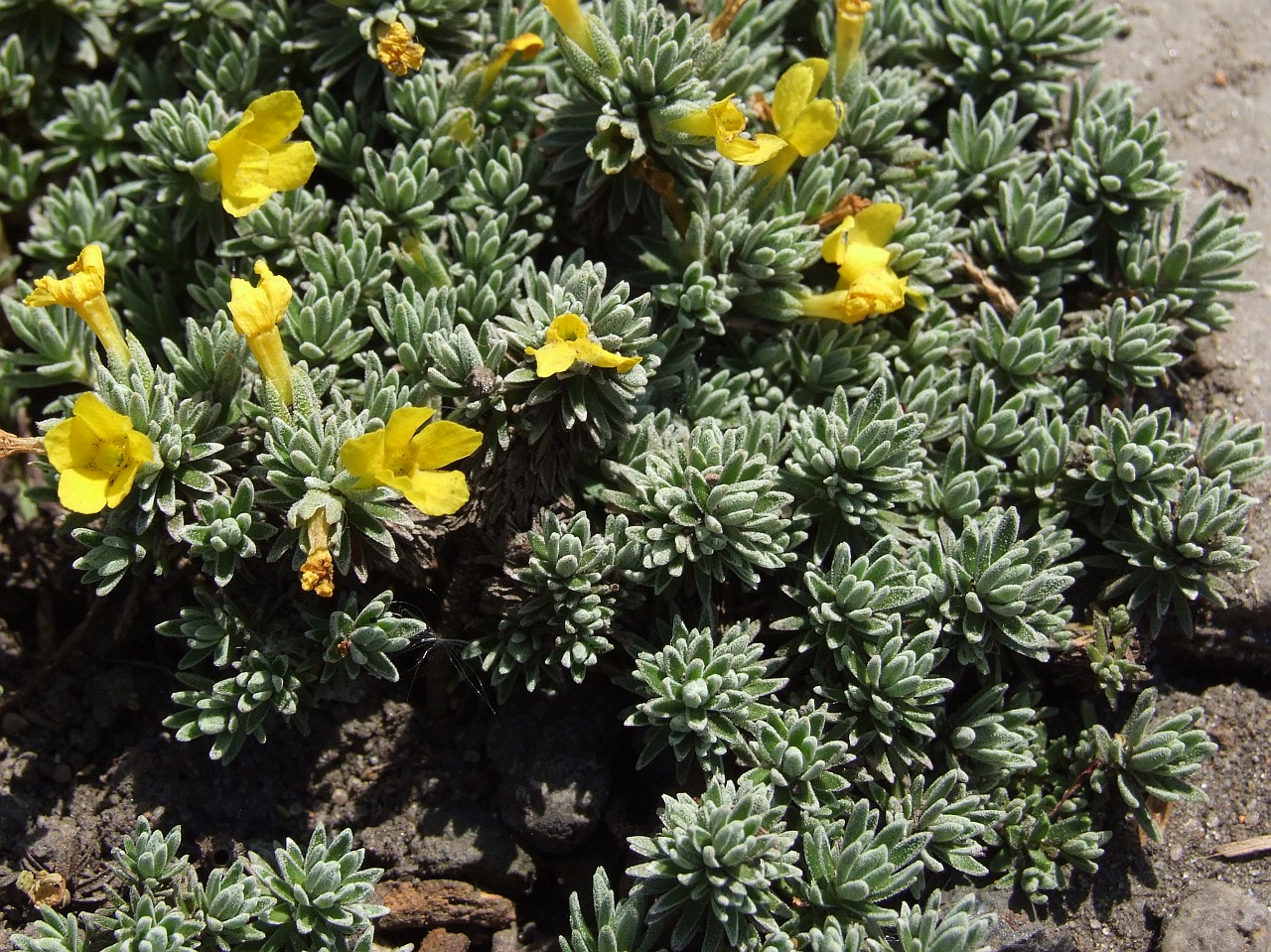 Vitaliana_primuliflora